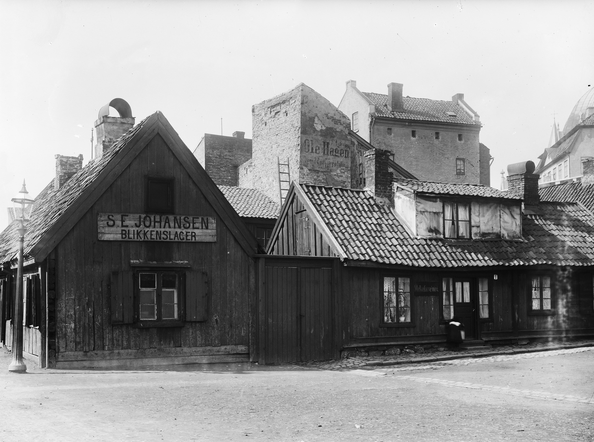 Fra gamle Hammersborg, ca. 1910-1920. Øvre Hammersborggate 7 til høyre, blikkenslageren hadde adresse Hammersborg torg 1